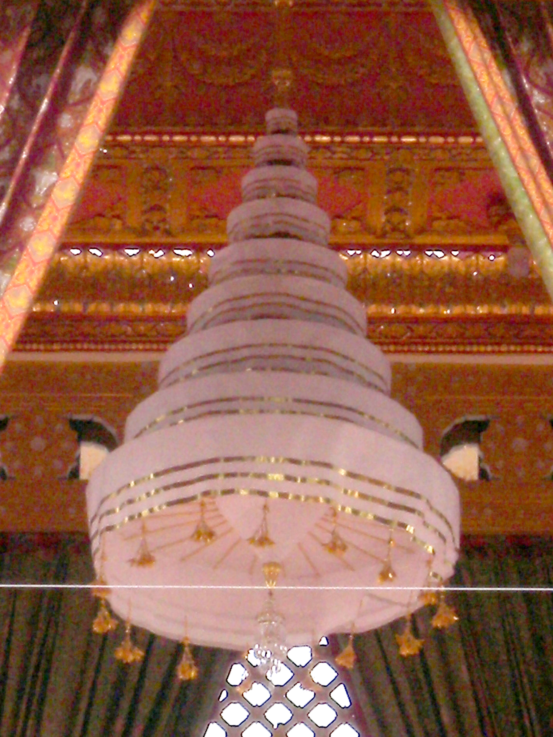 นพปฎลมหาเศวตฉัตร ซึ่งเจ้าพนักงานแขวนถวายเหนือพระจิตกาธานในขณะสุมพระบรมอัฐิ ประดิษฐานภายในบุษบกองค์ประธานแห่งพระเมรุมาศถวายพระเพลิงพระบรมศพ พระบาทสมเด็จพระปรมินทรมหาภูมิพลอดุลยเดช สยามินทราธิราช บรมนาถบพิตร ณ ท้องสนามหลวง กรุงเทพฯ